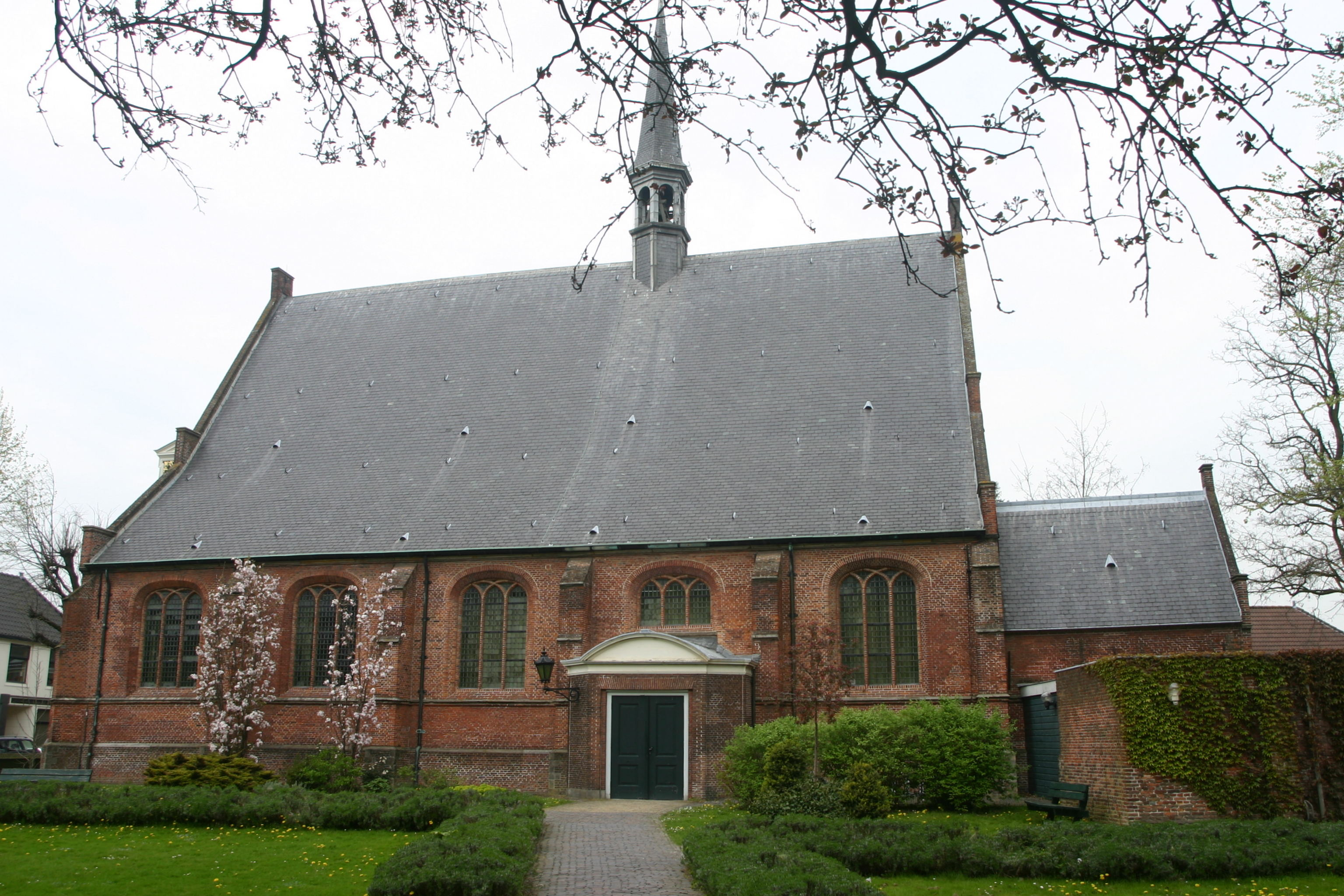 Dorpskerk Leiderdorp. Village church Leiderdorp, built in 1622.Rijksmonumentnummer 25693